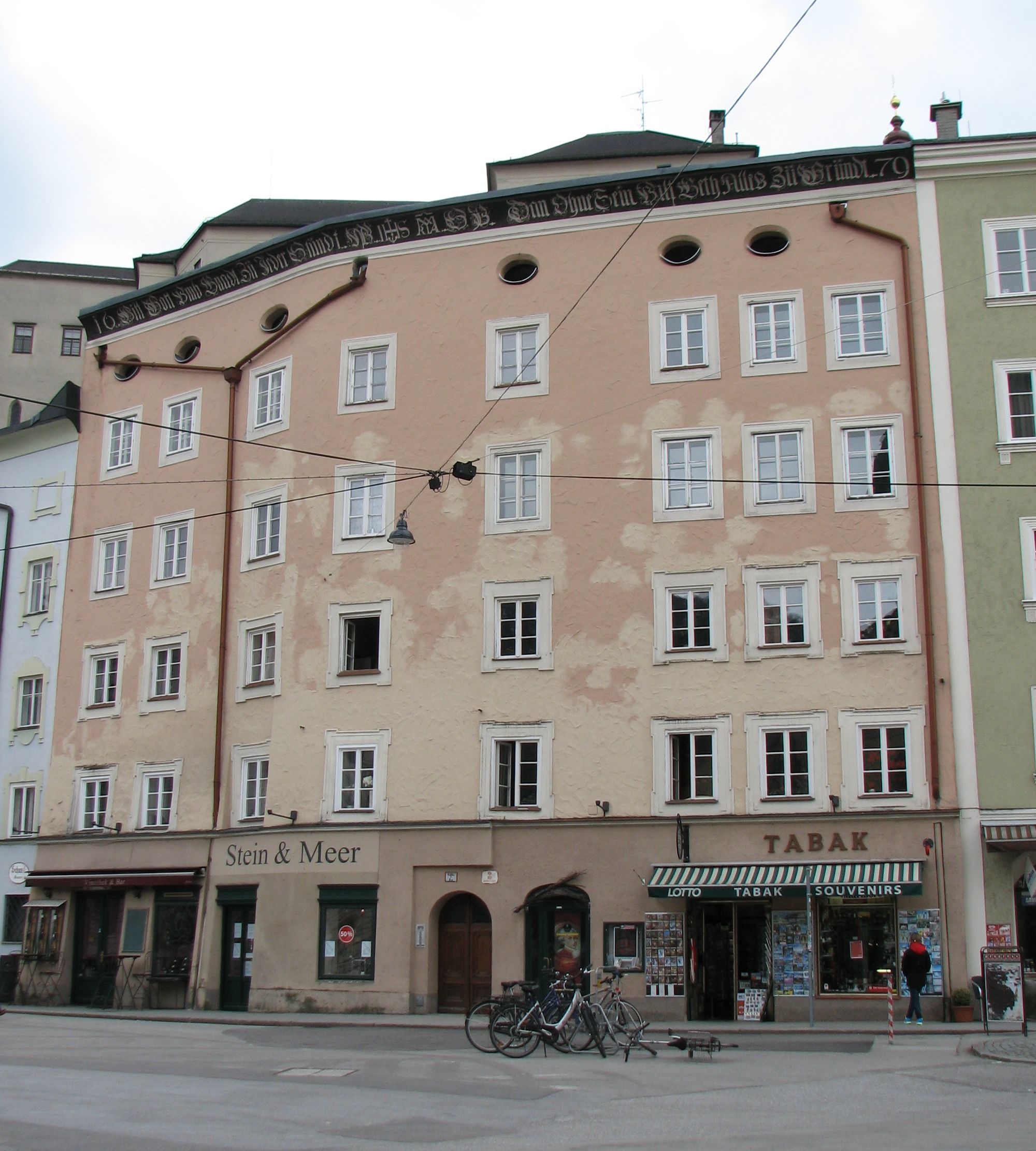 Bürgerhaus, Elefantenhaus